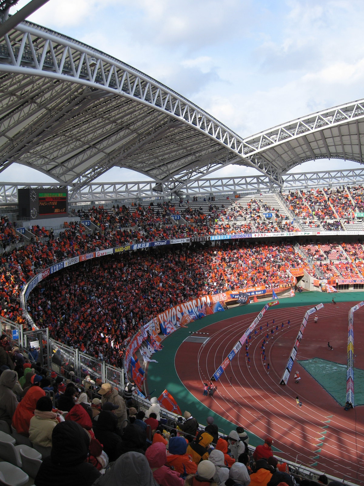 アルビレックス新潟、ゴール裏サポーター。 ２層目から撮影。